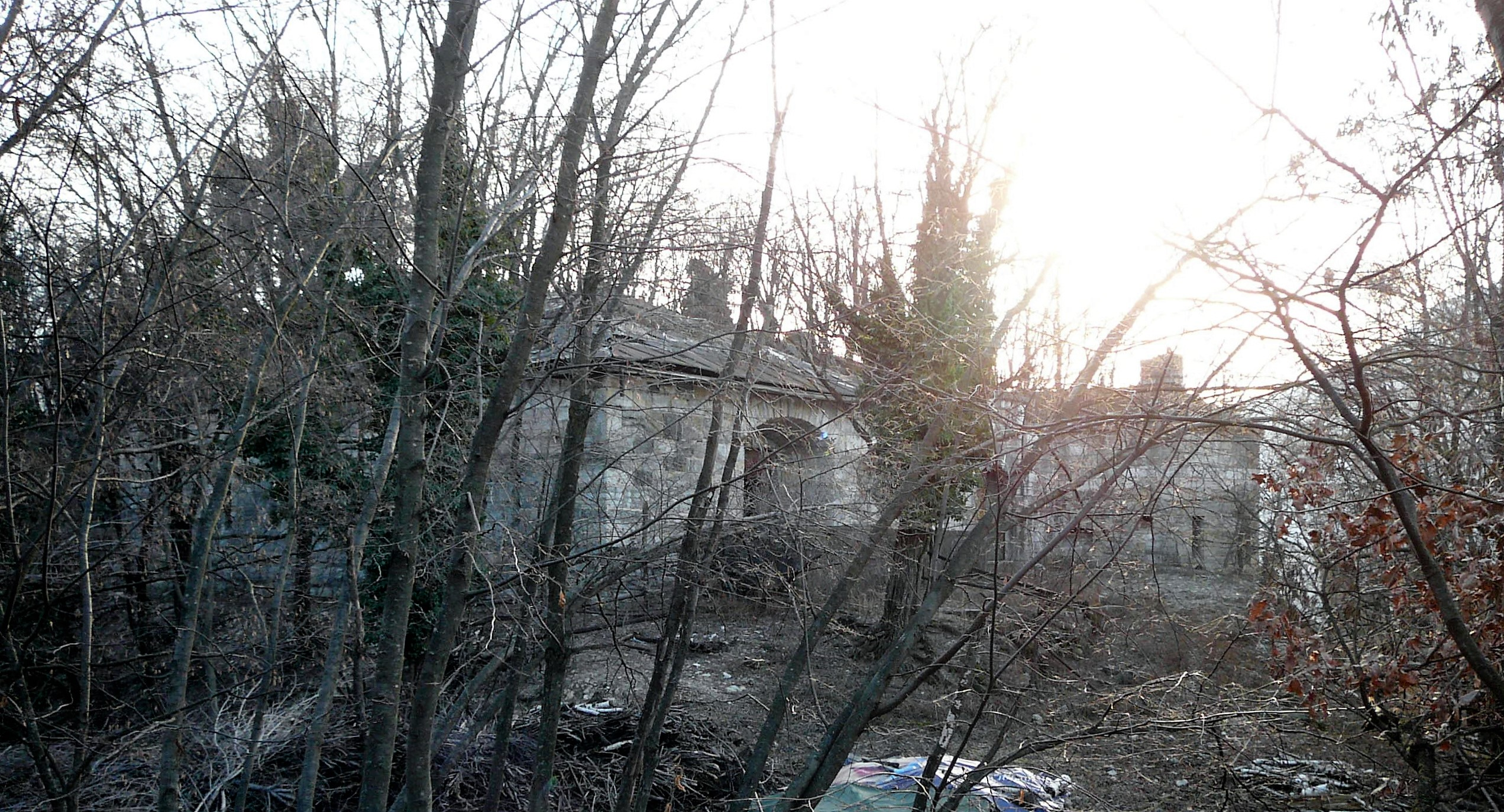 Forte san Rocco - parte restante